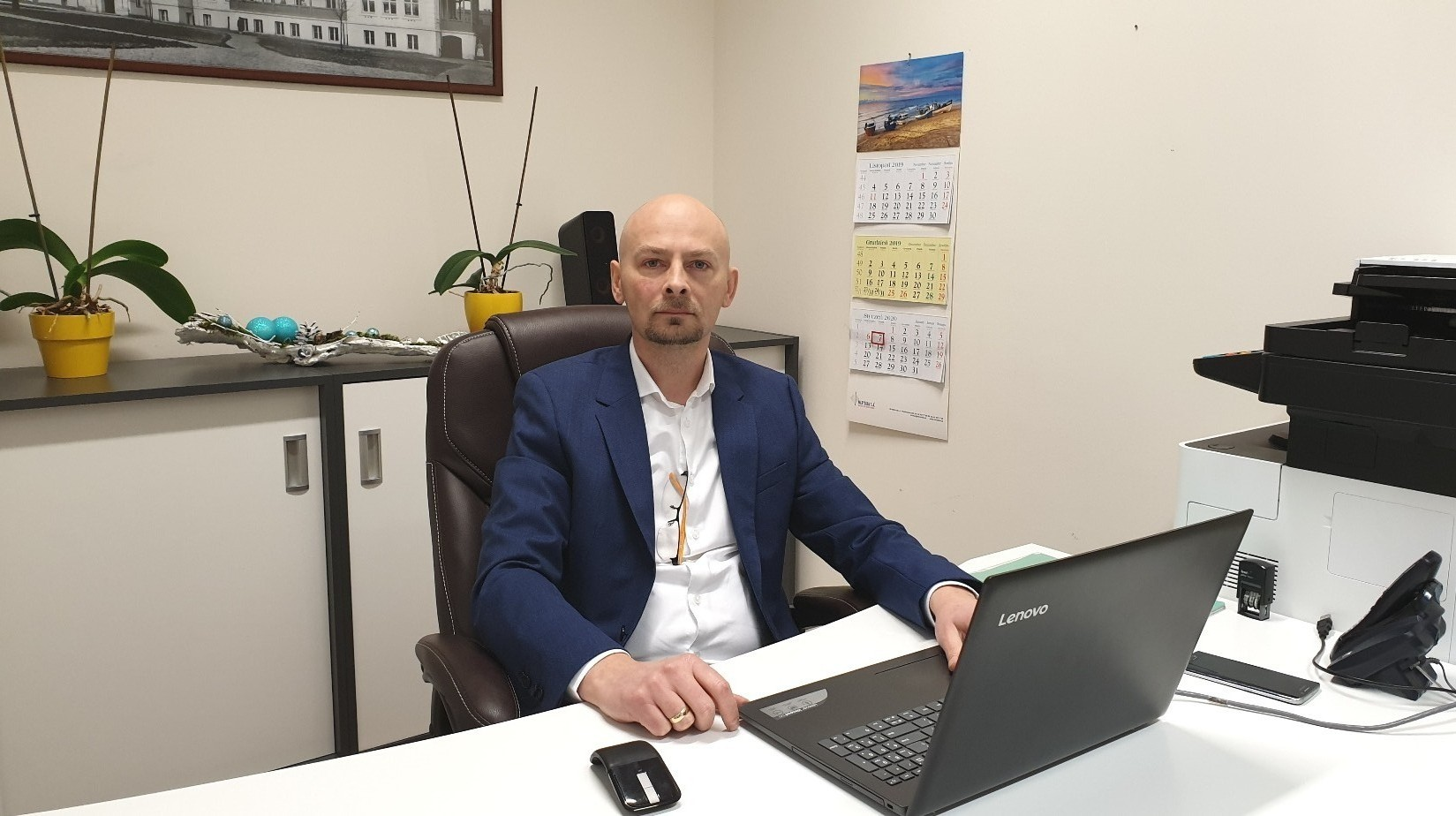 Rafał Dziubek. Szpital w Stargardzie